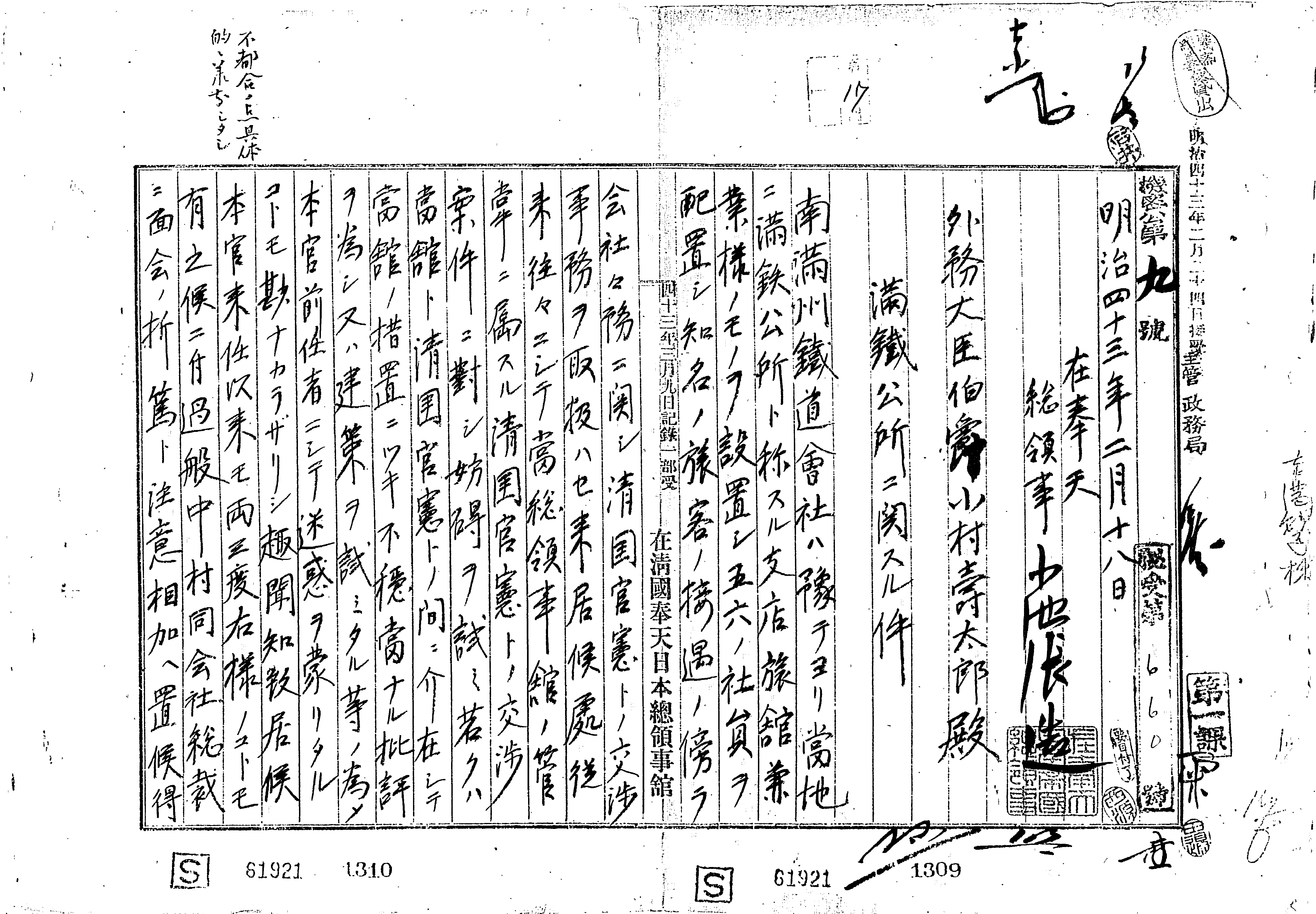 国立公文書館 アジア歴史資料センター「南満洲鉄道株式会社関係資料」